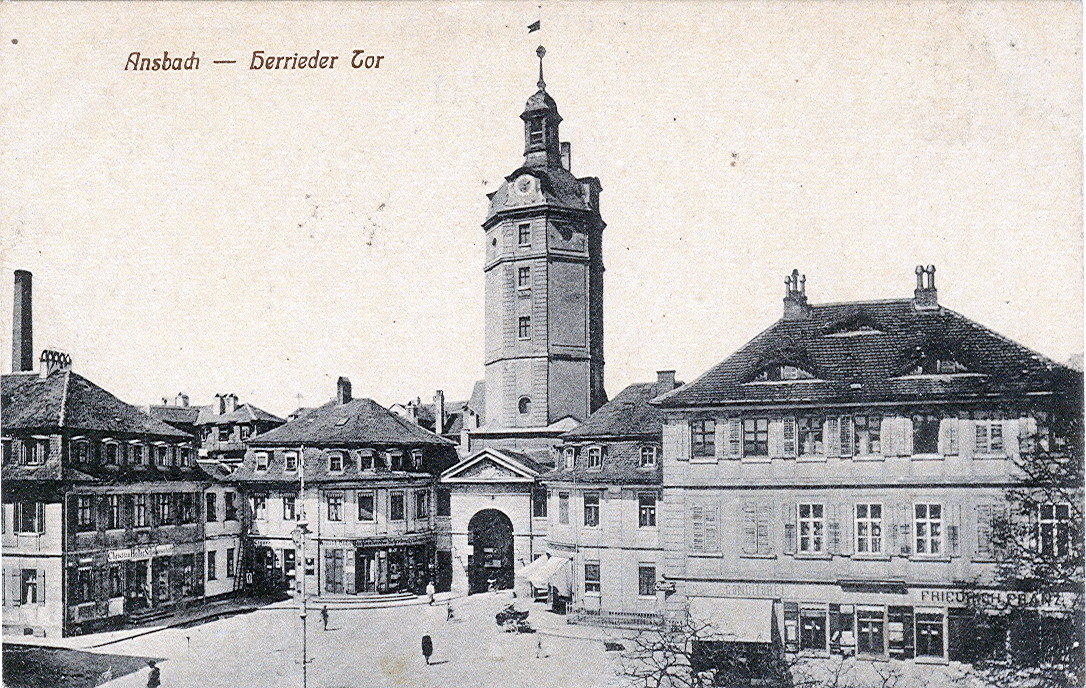 Postkarte, undatiert ( ca.1914 ). Beschriftung: "Ansbach - Herrieder Tor".